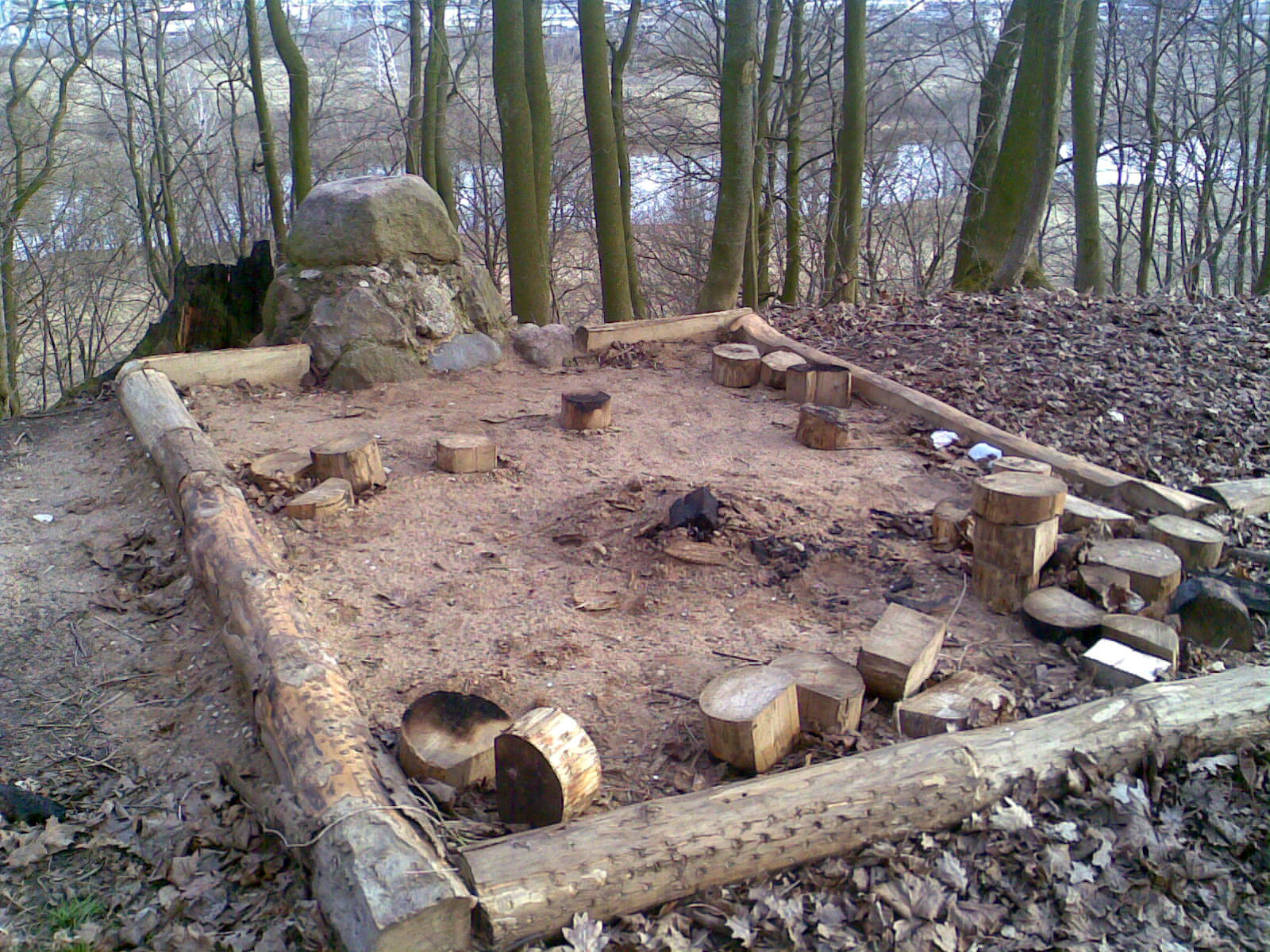 Gudžionių piliakalnis